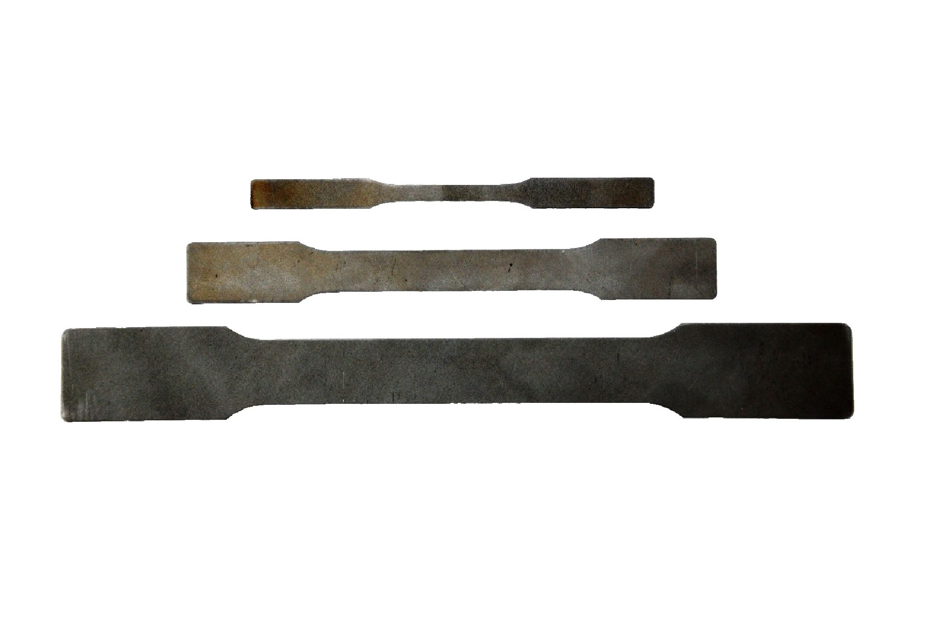 Warmumgeformte Zugproben